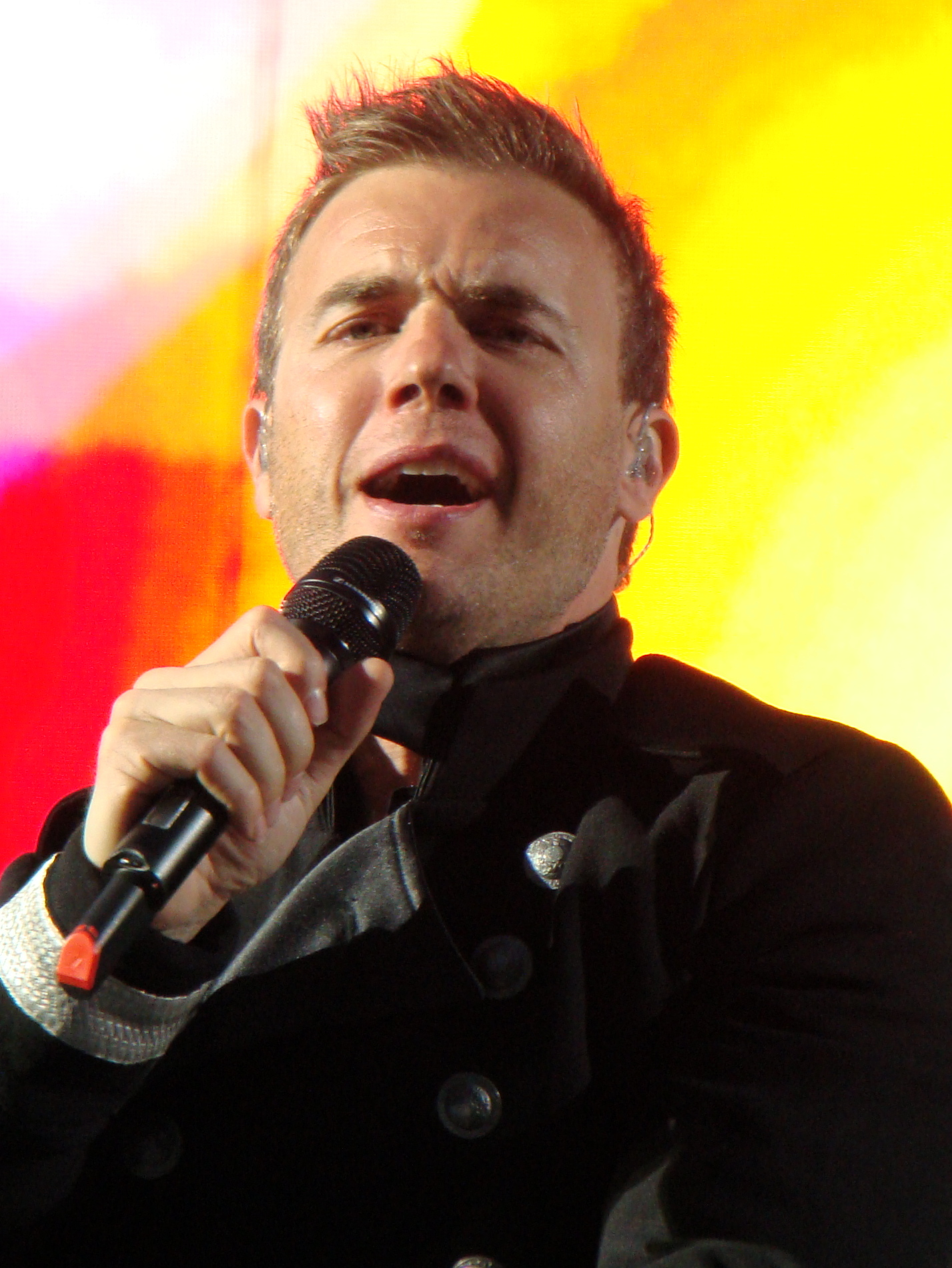 Take That